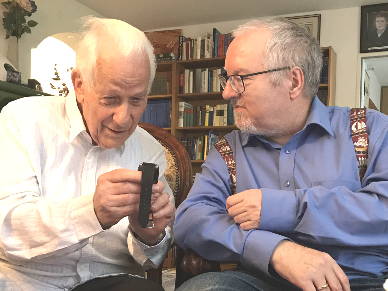 Gerhard erklärt Ingo seine intelligente Uhr, als sie im selben Moment das Foto aufnimmt gesteuert durch Antippen. Sie gibt den Befehl an eine Camera weiter. Sie kann unter vielen anderen Funktionen auch einen Notruf absetzen, da sie geortet werden kann.